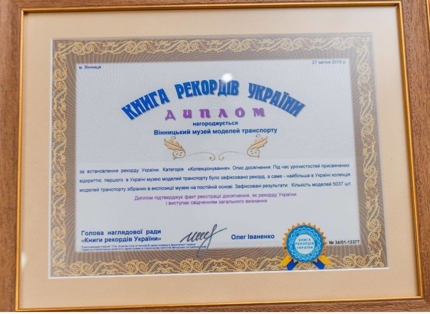 Диплом